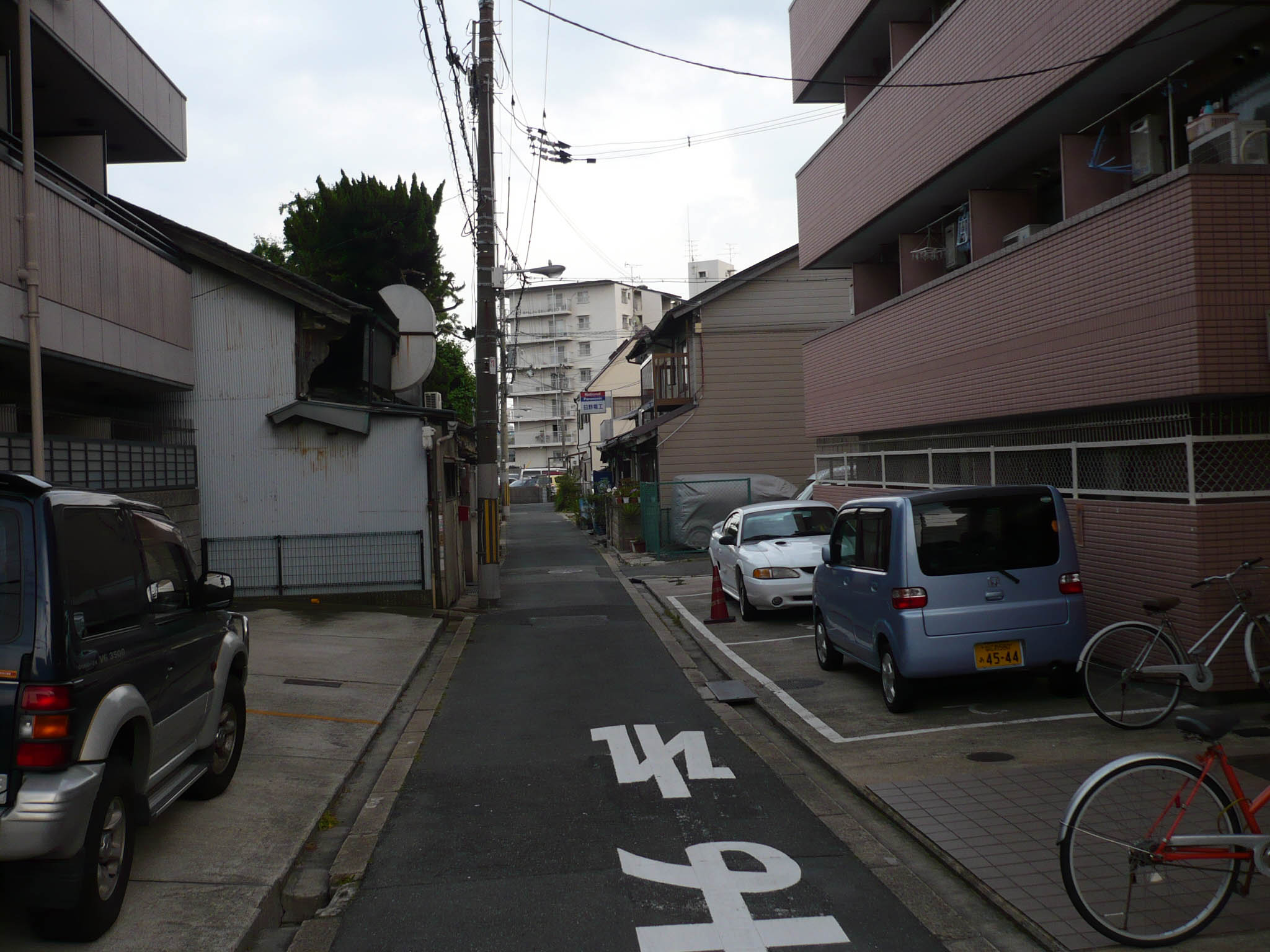 柴島城の推定地